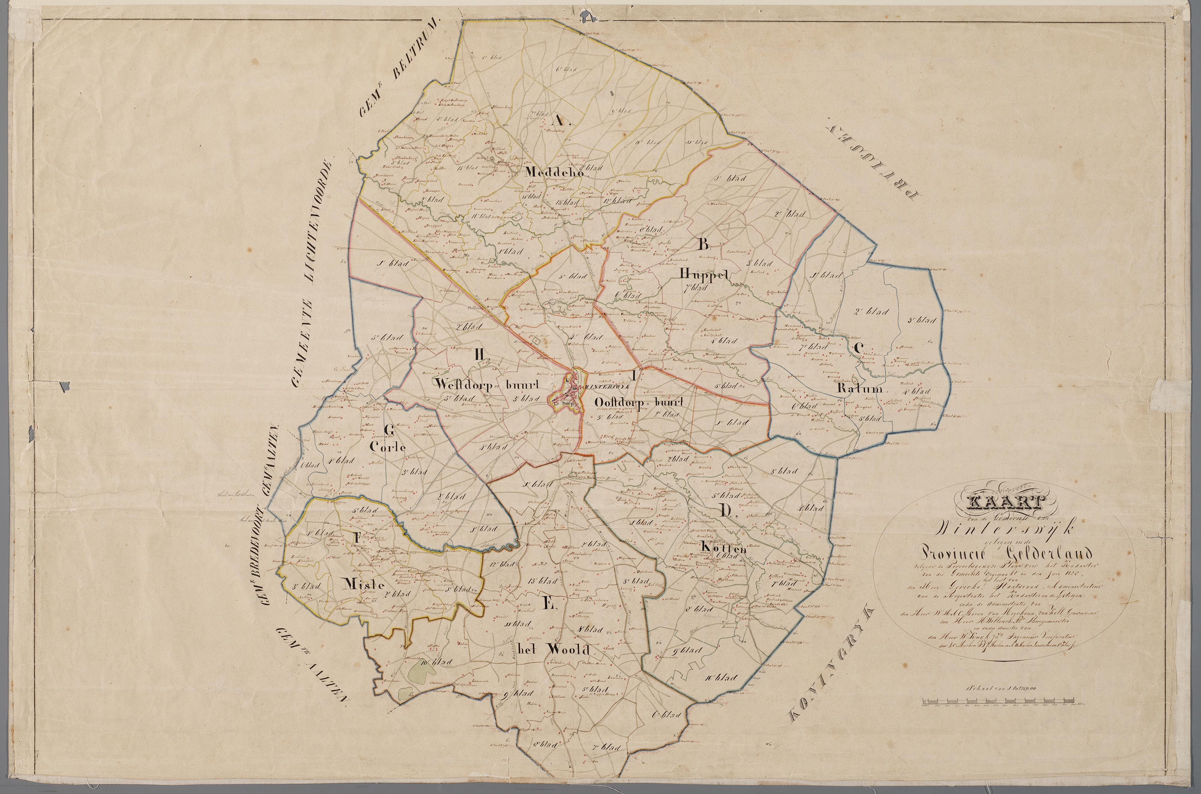 Kadastraal verzamelplan van Winterswijk, 1828